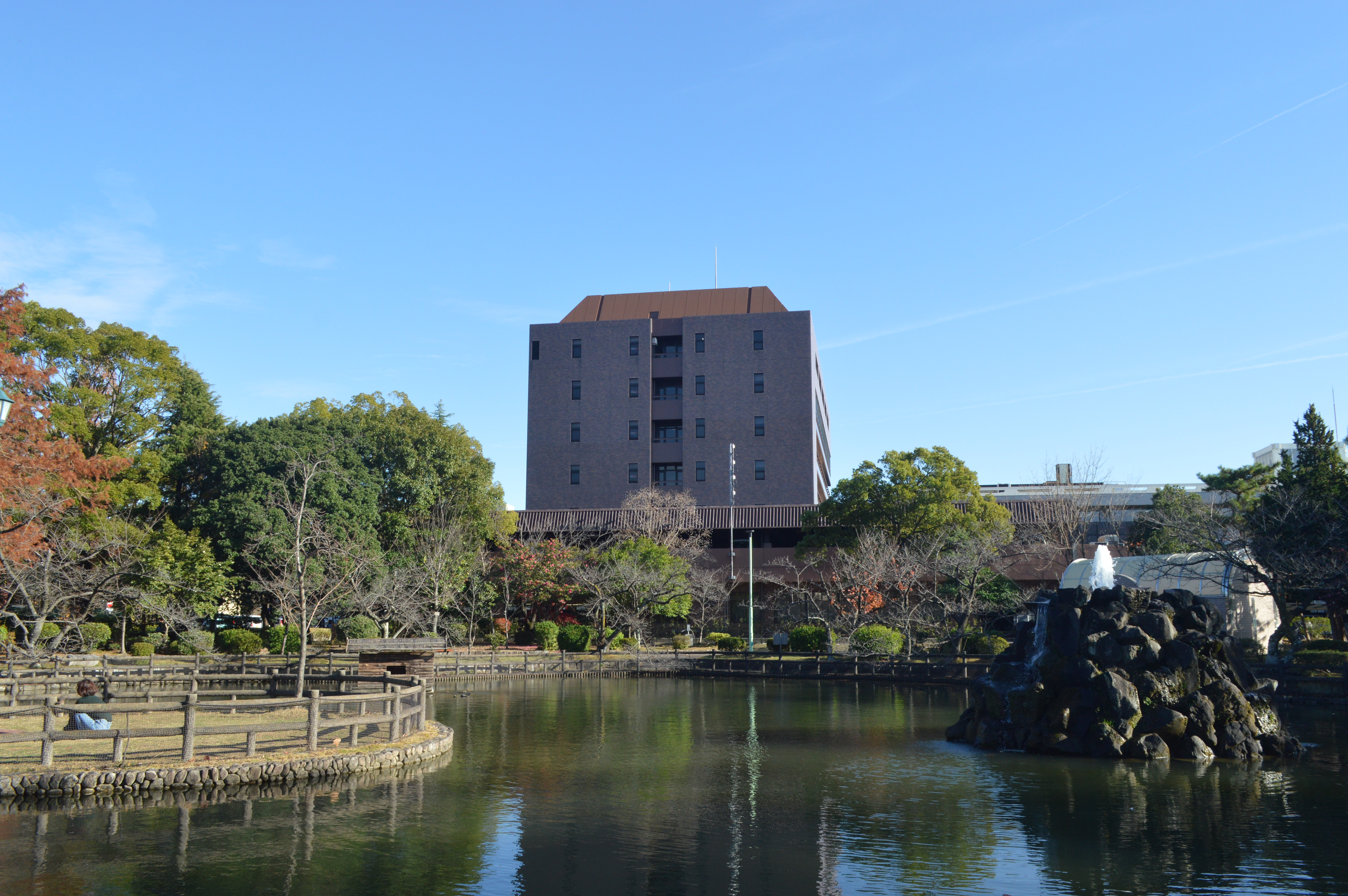 愛知県安城市にある安城公園。中央奥は安城市役所。